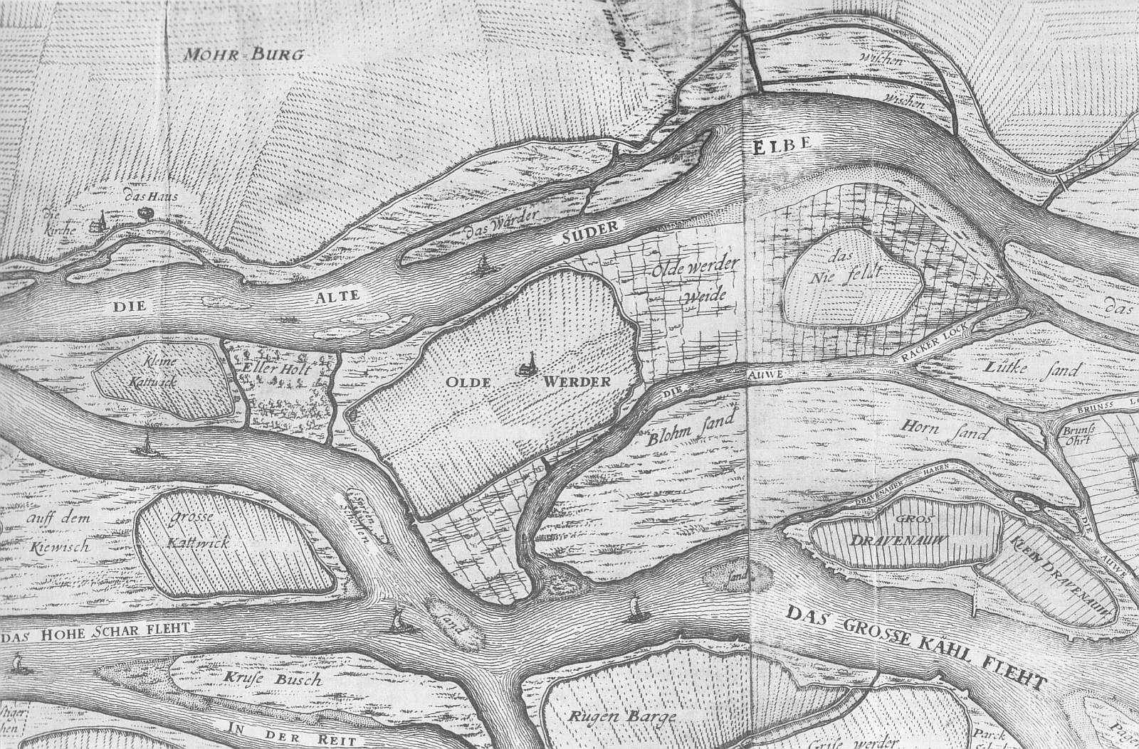 Elbkarte mit Hamburg-Altenwerder, Dradenau, Kattwik, Norderelbe und Süderelbe, Köhlfleet